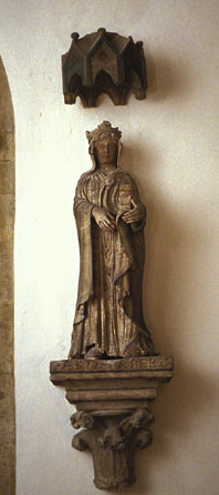 Beschreibung: Elisabeth-Statue im Naumburger Dom Quelle: Eigenaufnahme zu wissenschaftlichen Zwecken Fotograf: Matthias Hischer Lizenz: GNU FDL